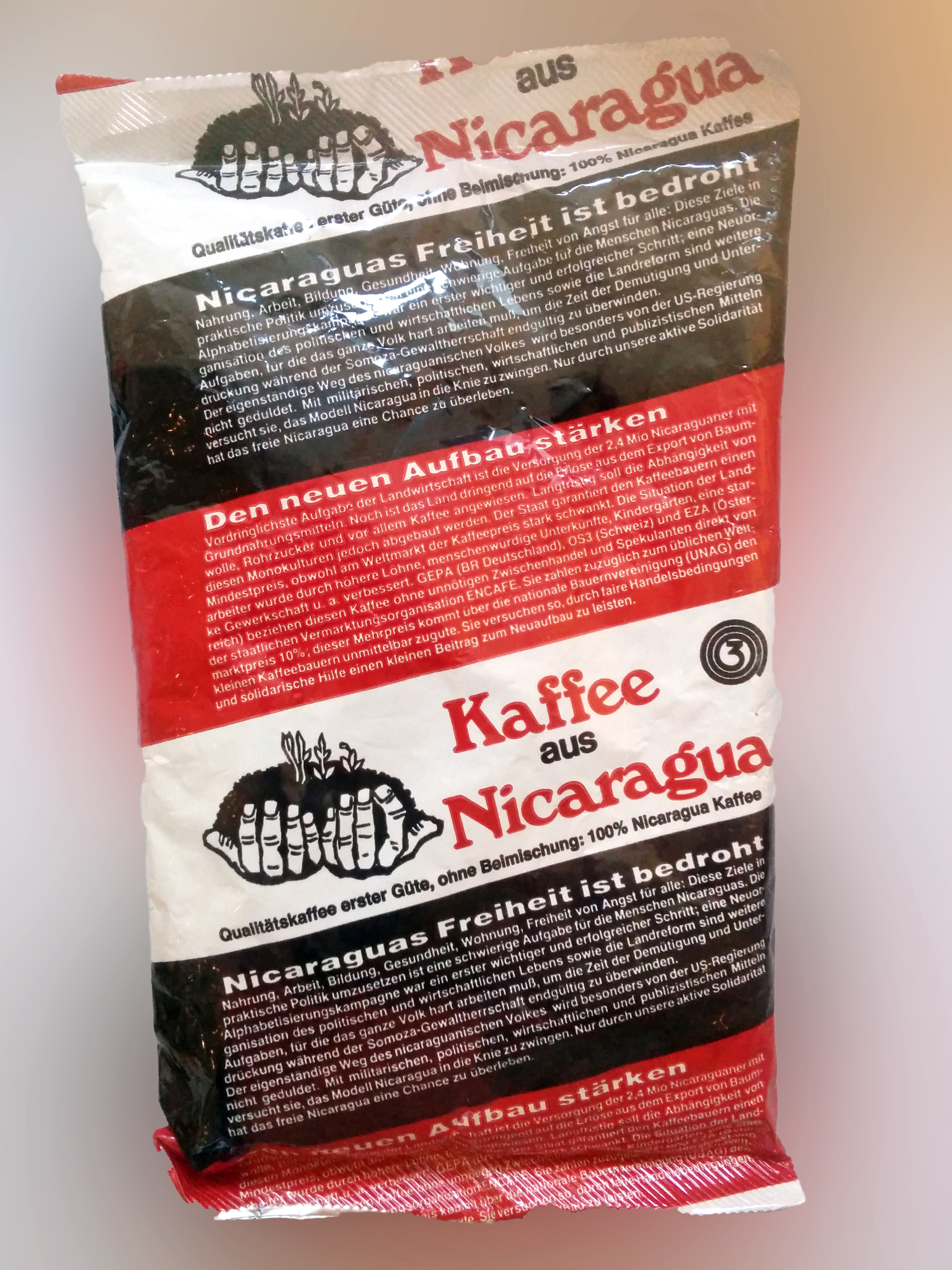 Paket "Nicaraguakaffee", wie in Deutschland in den 1980er Jahren vertrieben. Aufnahme aus dem Schokoladenmuseum, Köln